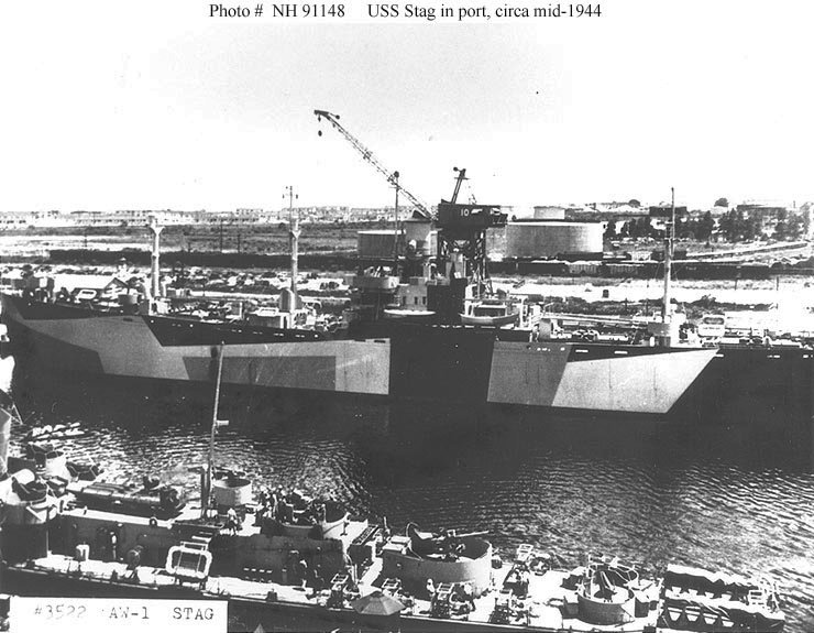 USS Stag (AW-1)